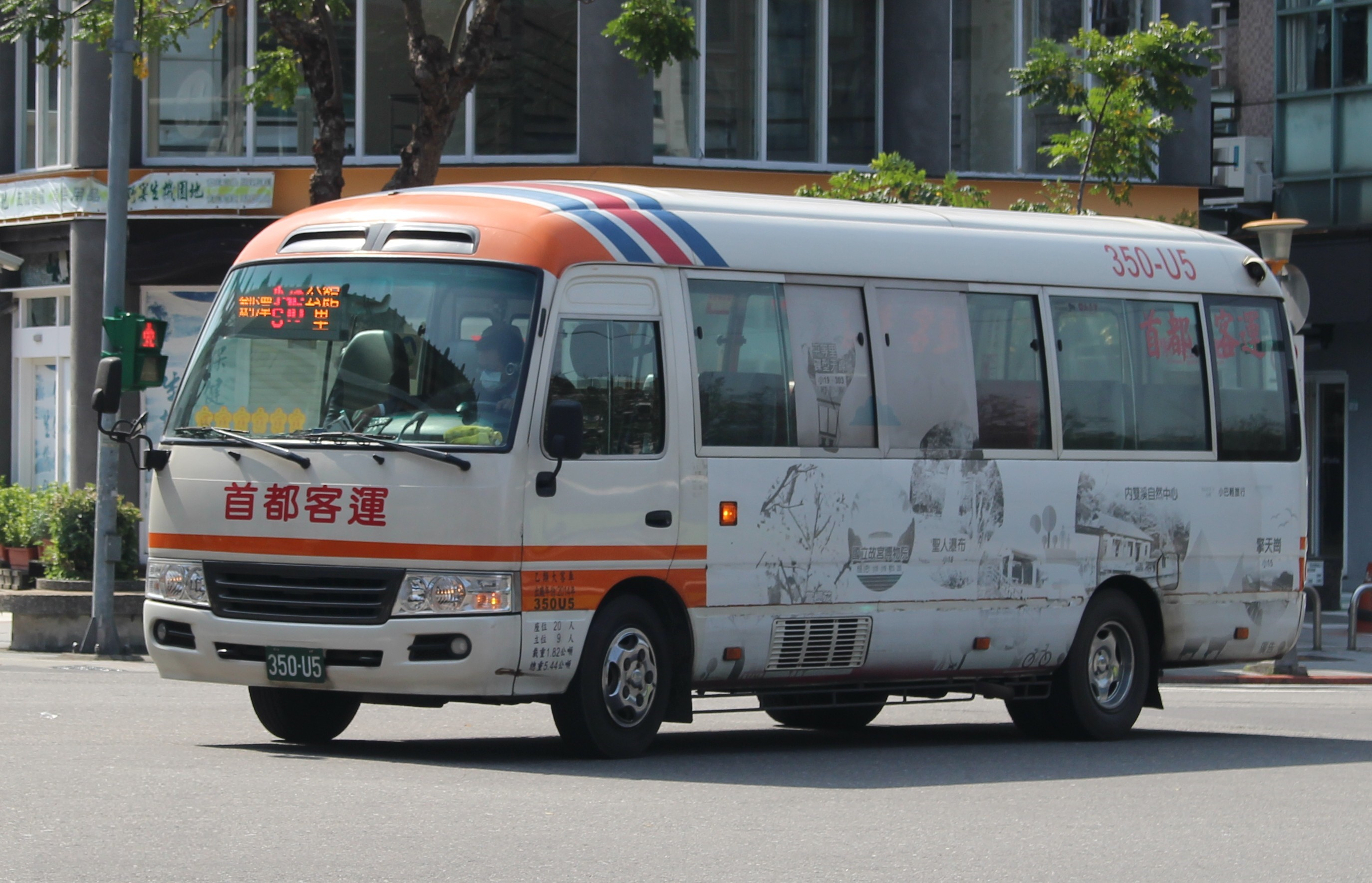 首都客運2014 TOYOTA COASTER ZB50L-ZEMSYR 350-U5 S16.jpg